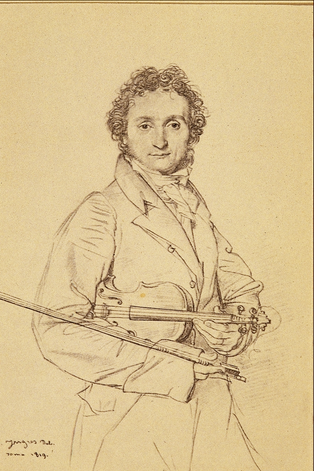 Portrait du violoniste Paganini